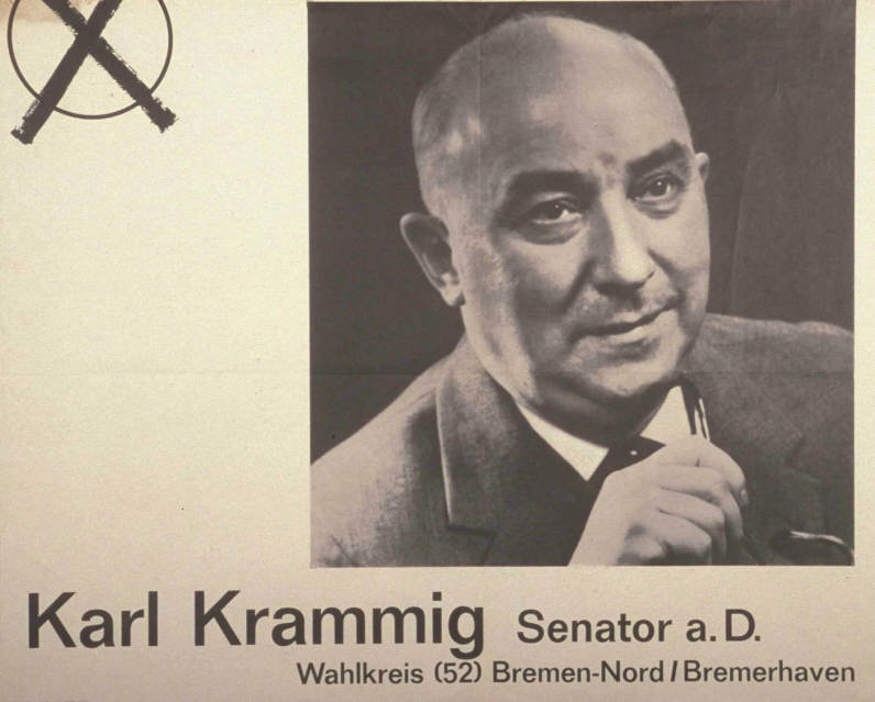 Karl Krammig Senator a.D. Wahlkreis (52) Bremen-Nord/Bremerhaven Abbildung: Porträtfoto - Stimmkreuz Plakatart: Kandidaten-/Personenplakat mit Porträt Auftraggeber: CDU Bonn Drucker_Druckart_Druckort: KVD Köln Objekt-Signatur: 10-001 : 1250 Bestand: Plakate zu Bundestagswahlen (10-001) GliederungBestand10-18: Plakate zu Bundestagswahlen (10-001) » Die 5. Bundestagswahl am 19. September 1965 » CDU » Mit Porträtfoto Lizenz: KAS/ACDP 10-001 : 1250 CC-BY-SA 3.0 DE